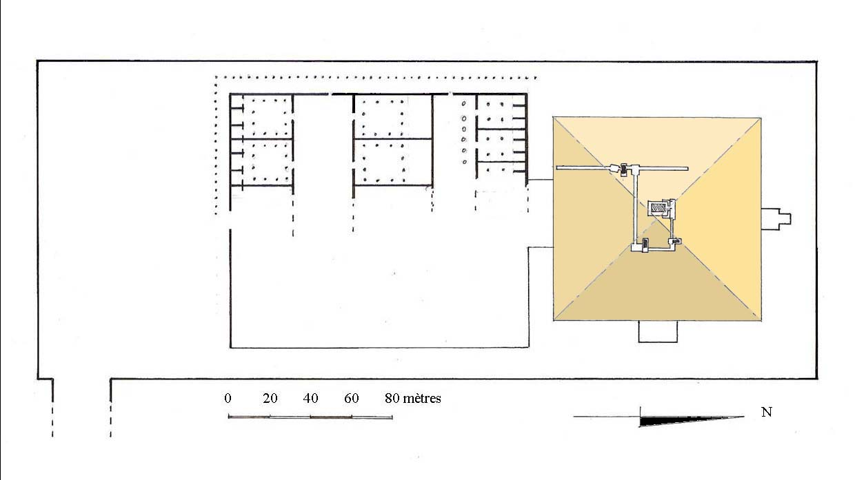 Plan du complexe funéraire d'amenemhat III à hawara ( d'après Petrie ) תכנית מכלול הקבר של אמנמחת השלישי בחווארה ( על פי פלינדרס פיטרי